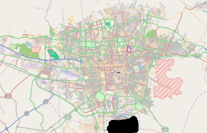 موقعیت شهر ری در نقشه تهران. شهر ری در جنوب تهران و در همسایگی این شهر است و در تقسیم بندی شهری منطقه 20 تهران محسوب می گردد.